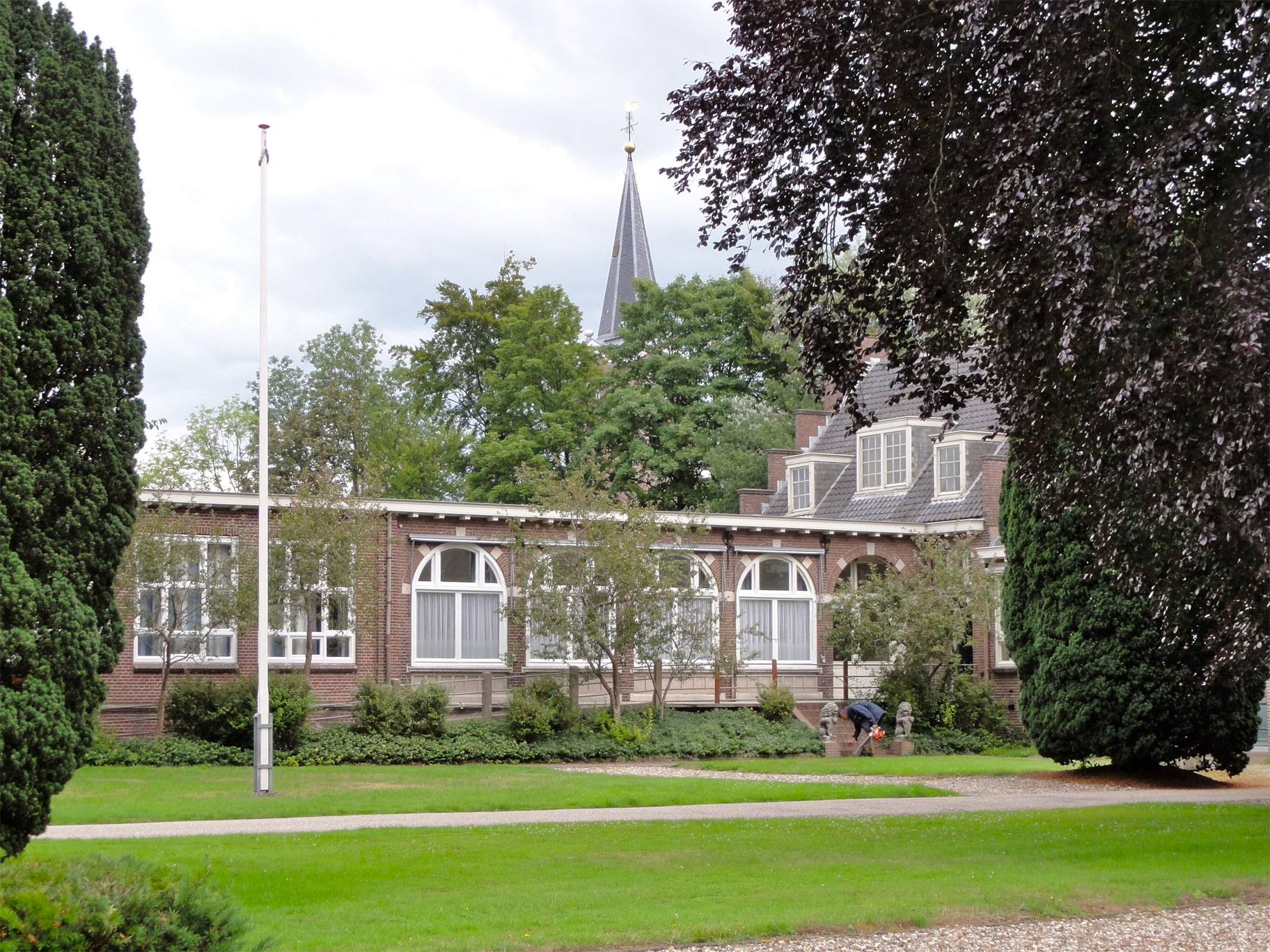 Bijgebouw Lynedensteyn, Hoofdstraat 3 te Beetsterzwaag